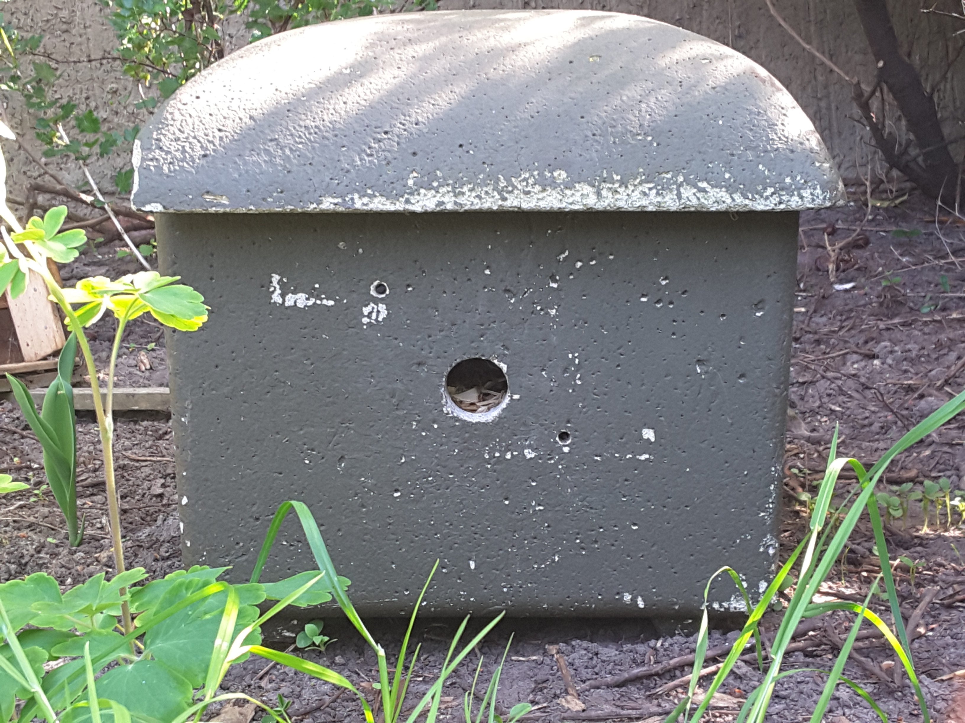 Schwegler Hummelhaus oberirdisch ohne Vorbau